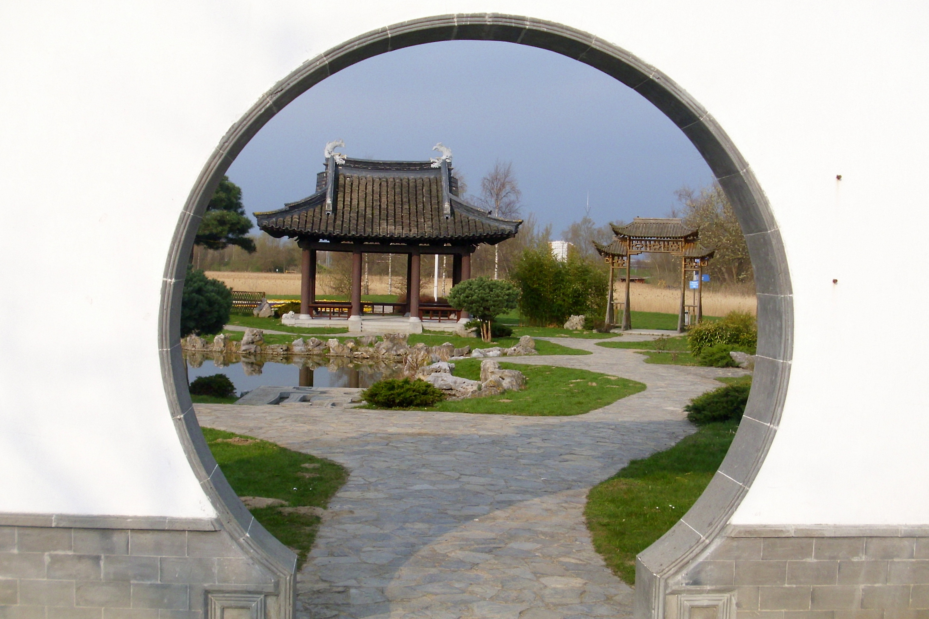 Blick in den Chinesischen Garten auf der IGA Rostock